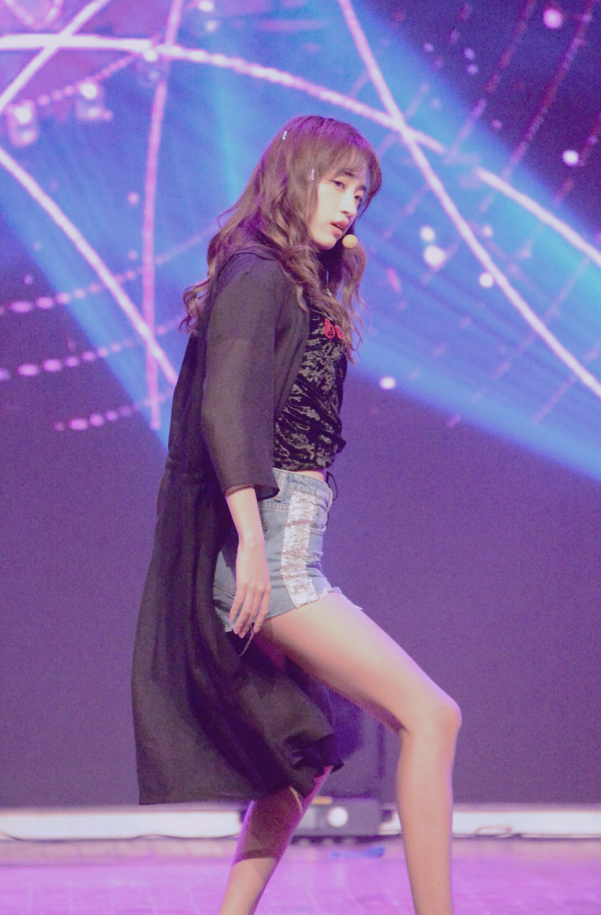 180525咪咕长沙巡演实图